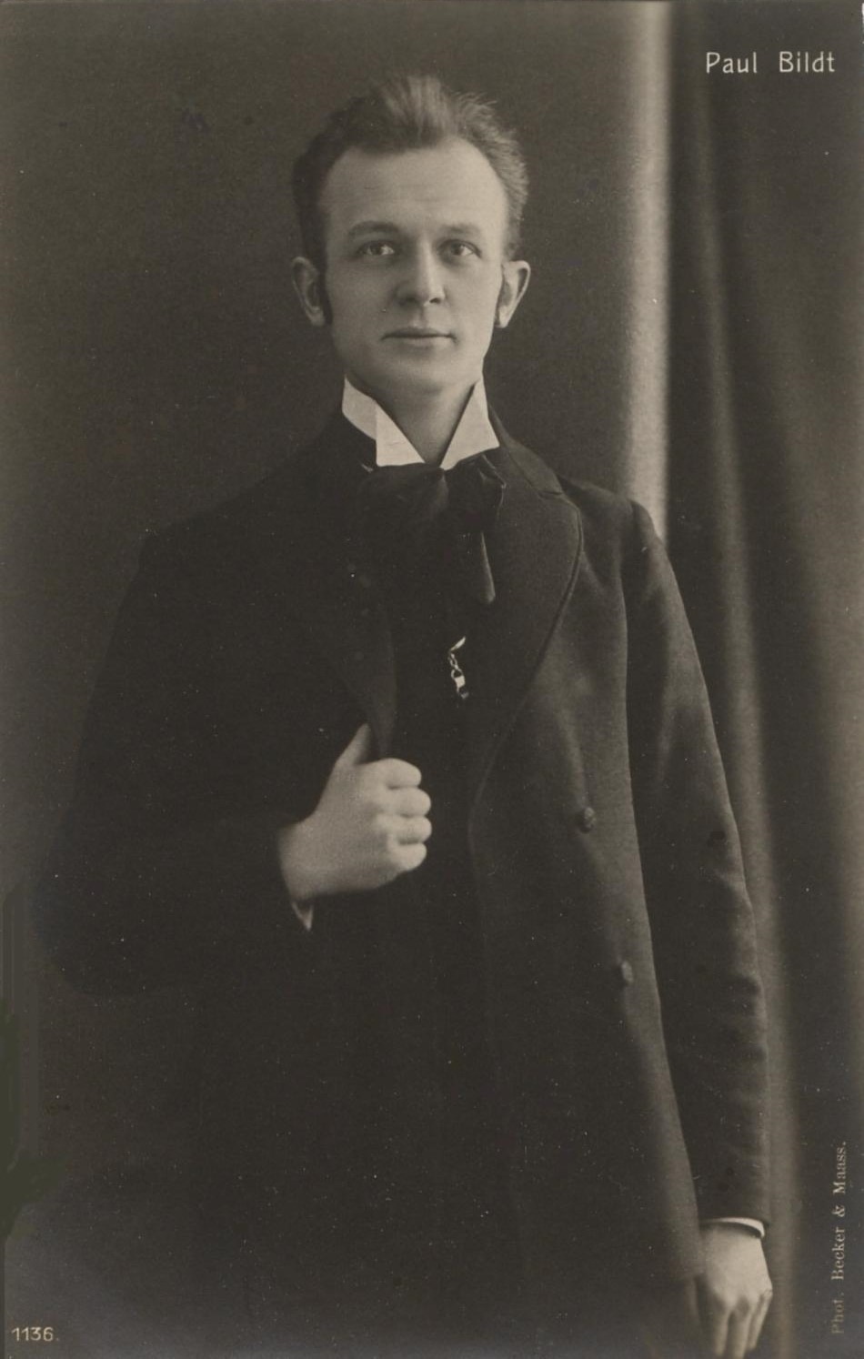 Der Schauspieler Paul Bildt um 1920. Photopostkarte des Ateliers (Otto) Becker & (Heinrich) Maass